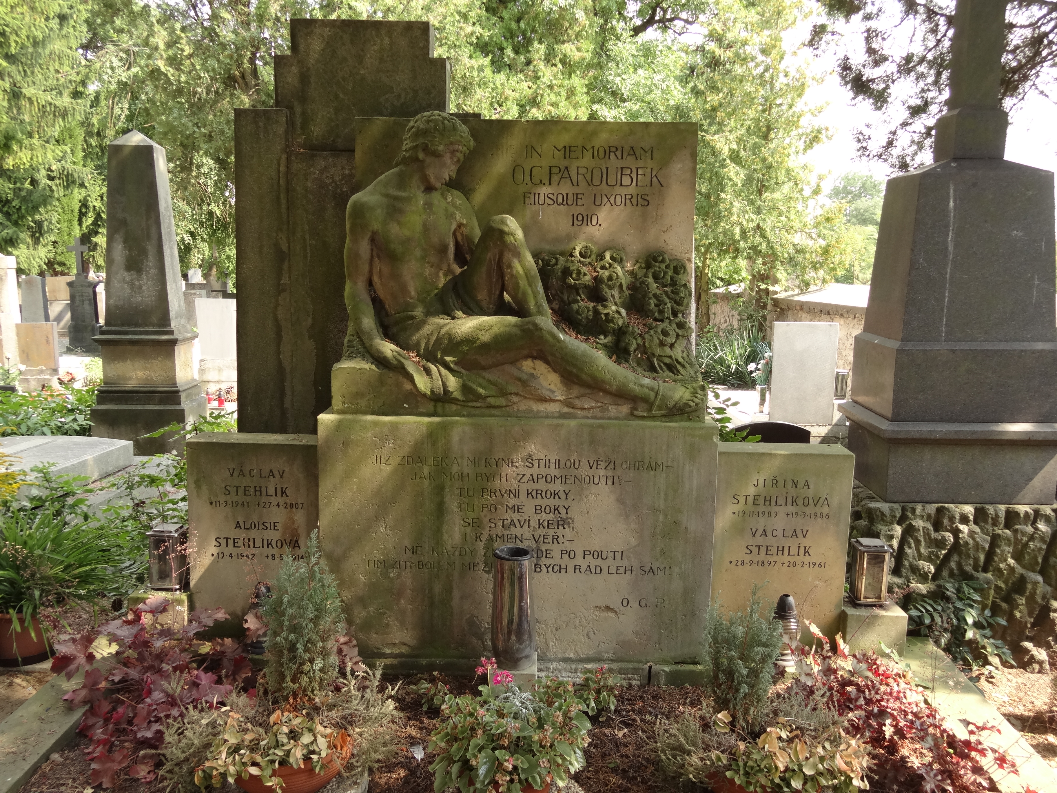 Pomník O. G. Paroubka, centrální část hřbitova, u prodl. ul. Podskalí, pp. 1228, Sadská.